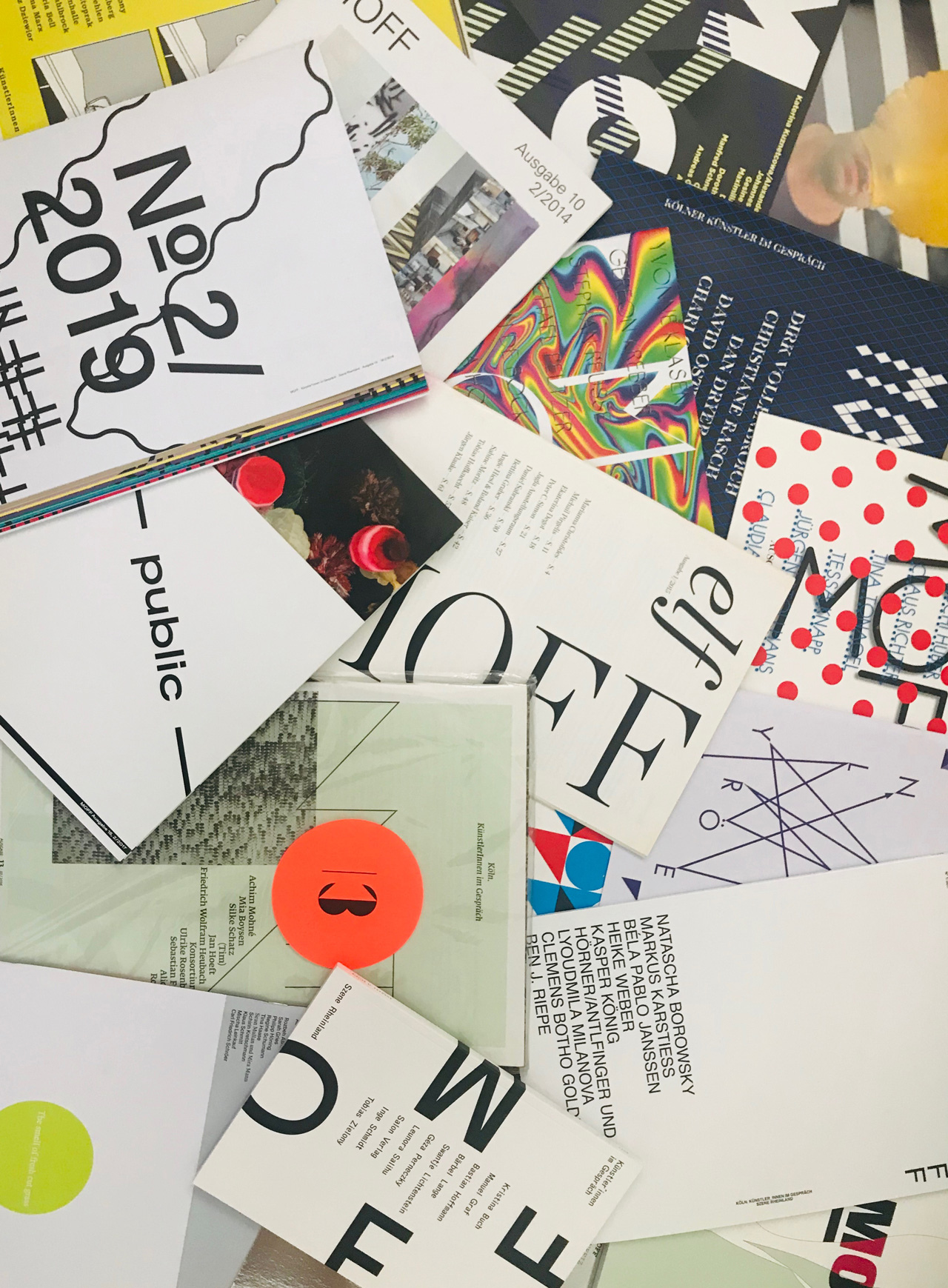 Abbildung aller Cover des Magazins "MOFF Künstler_innen im Gespräch - Szene Rheinland"